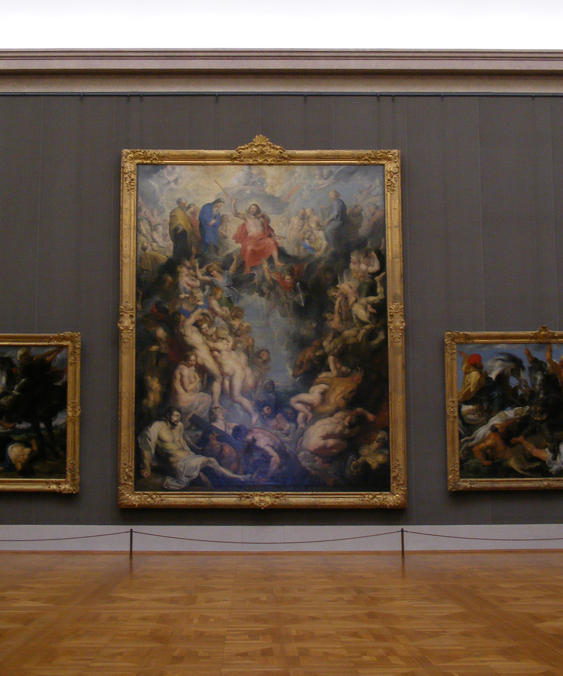 Das Große Jüngste Gericht DSCF5095.JPG